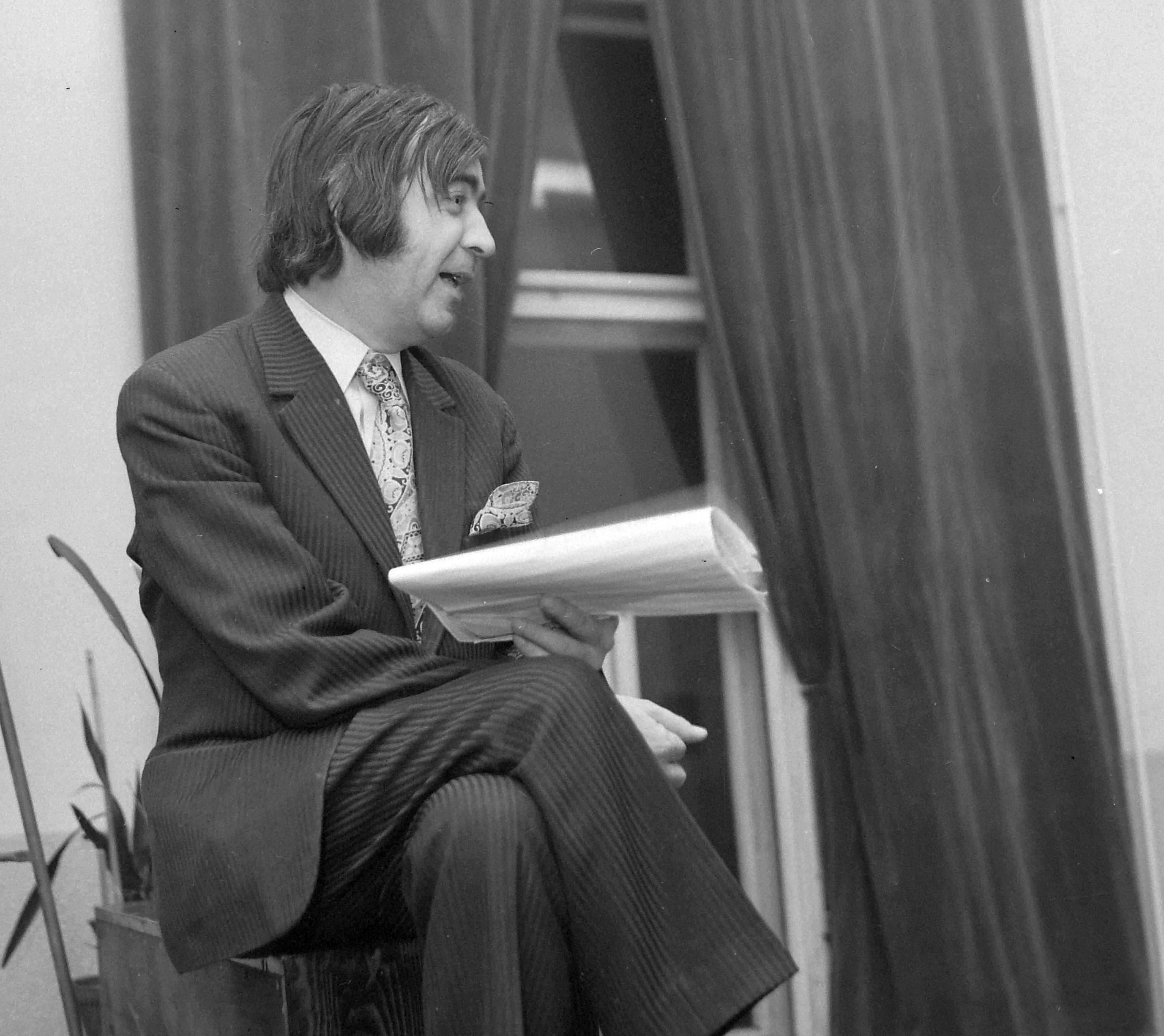 Vujicsics Tihamér zeneszerző. Location: Hungary Tags: celebrity Title: Vujicsics Tihamér zeneszerző.